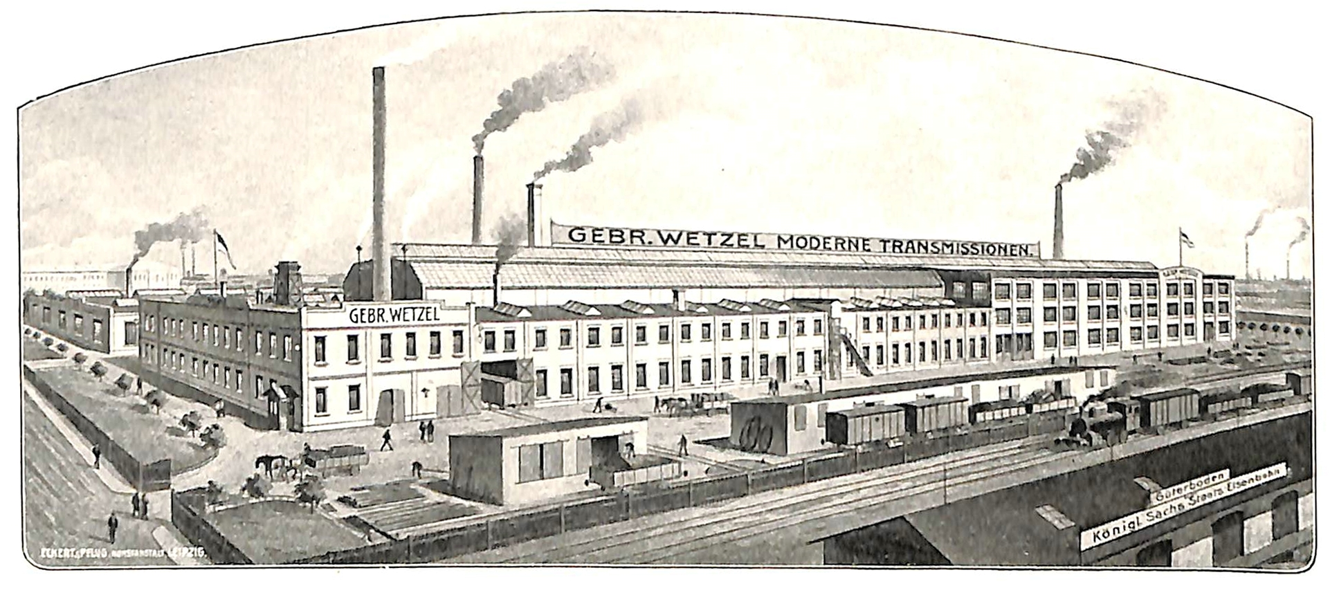 Leipzig - Ansicht der Maschinenfabrik Gebrüder Wetzel. In diesem 1886 gegründeten Werk in Plagwitz wurden Transmissionswellen bis 10 m Länge, auch Riemen und Seilscheiben für die Industriemaschienen, Sägewerke und Landmaschinen von 220 Mitarbeiern gefertigt.